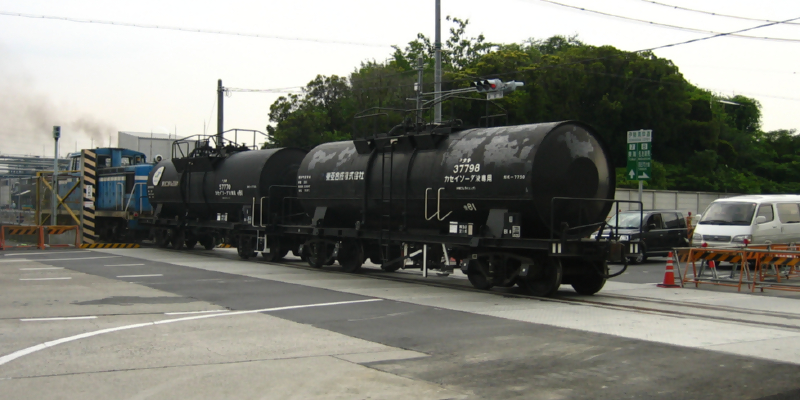 名古屋臨海鉄道昭和町線の踏切信号。左奥が東亞合成名古屋工場の敷地。手前の貨車はカセイソーダ液専用のタキ7750形37798。列車の通過を待つ道路が愛知県道55号。 ※なお2011年以降はこの踏切の上を名古屋高速4号の高架が跨いでいる。